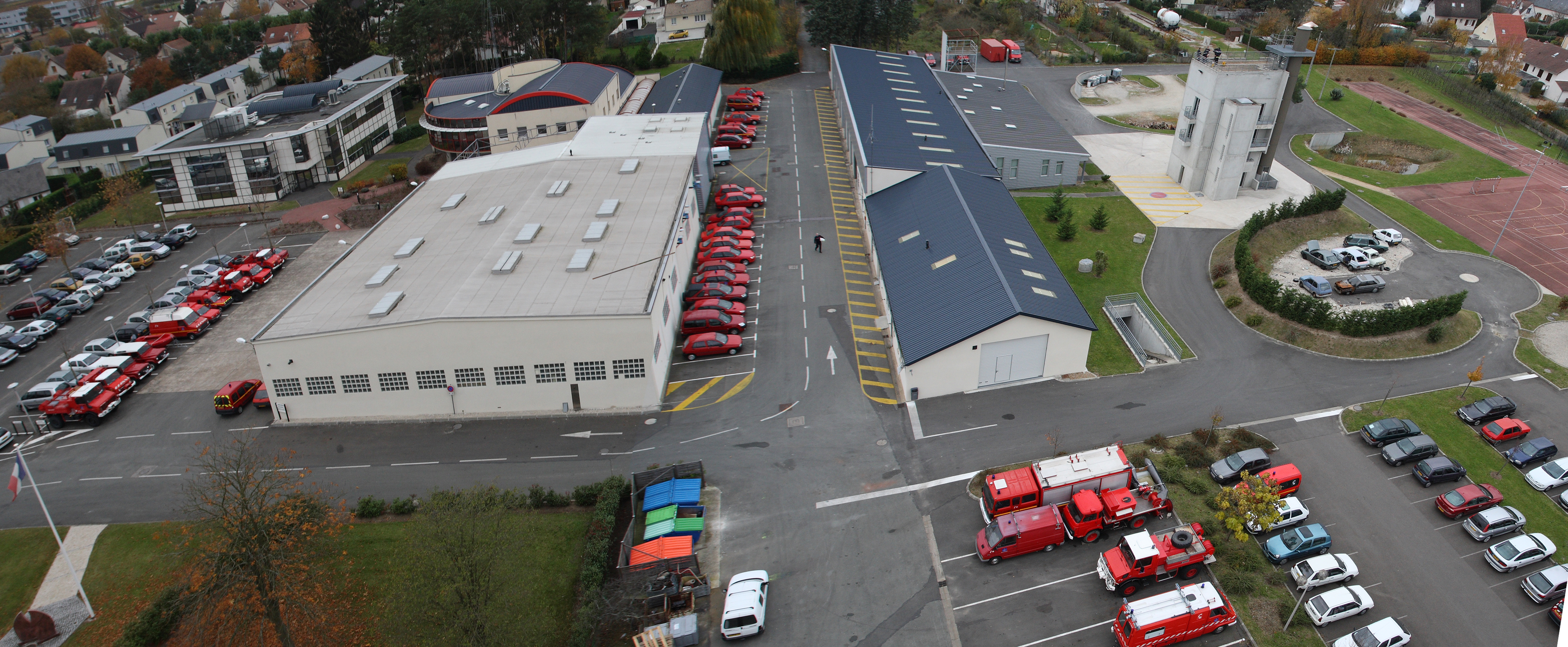 Vue aérienne d'une caserne du SDIS du Loiret.